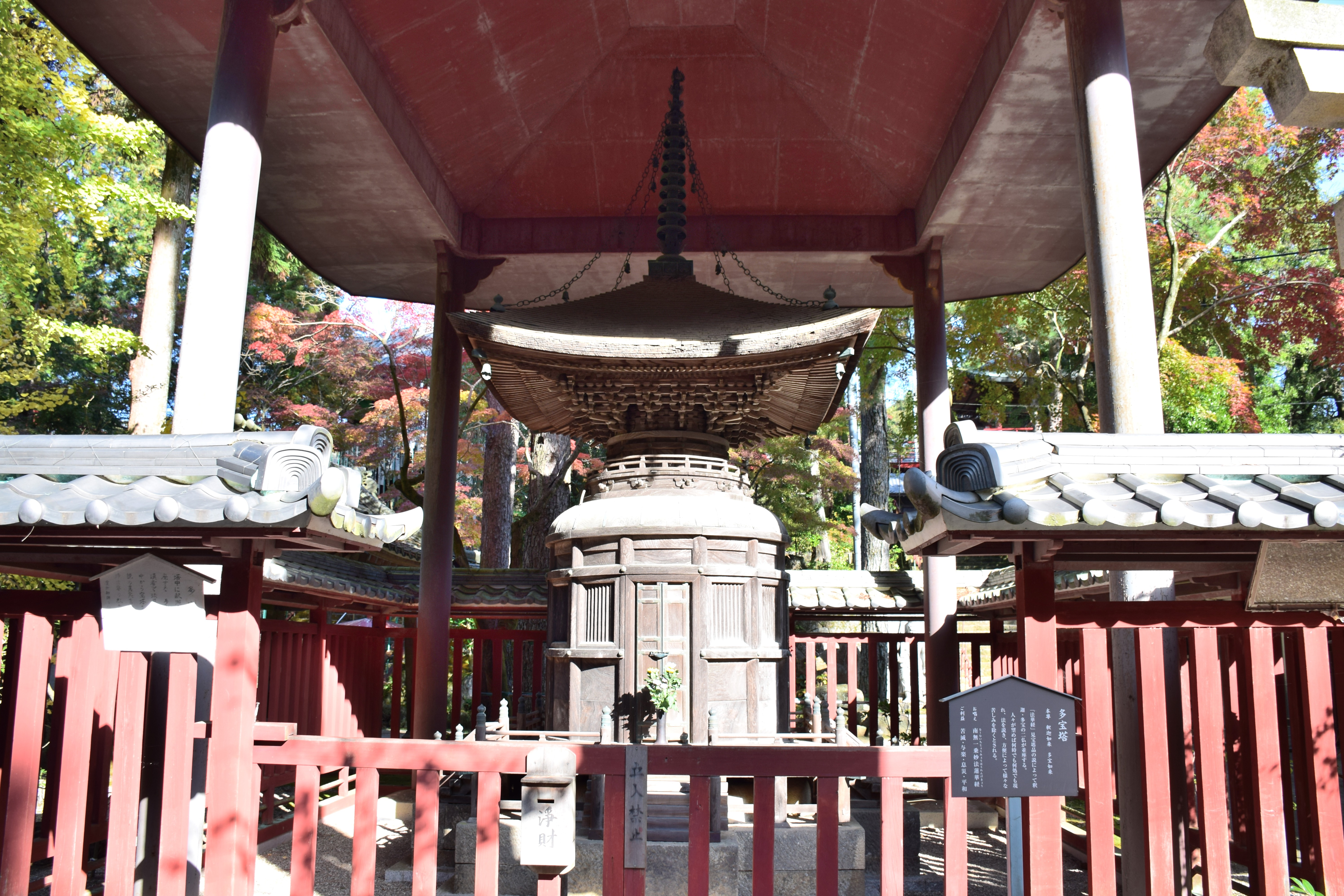 真福寺多宝塔